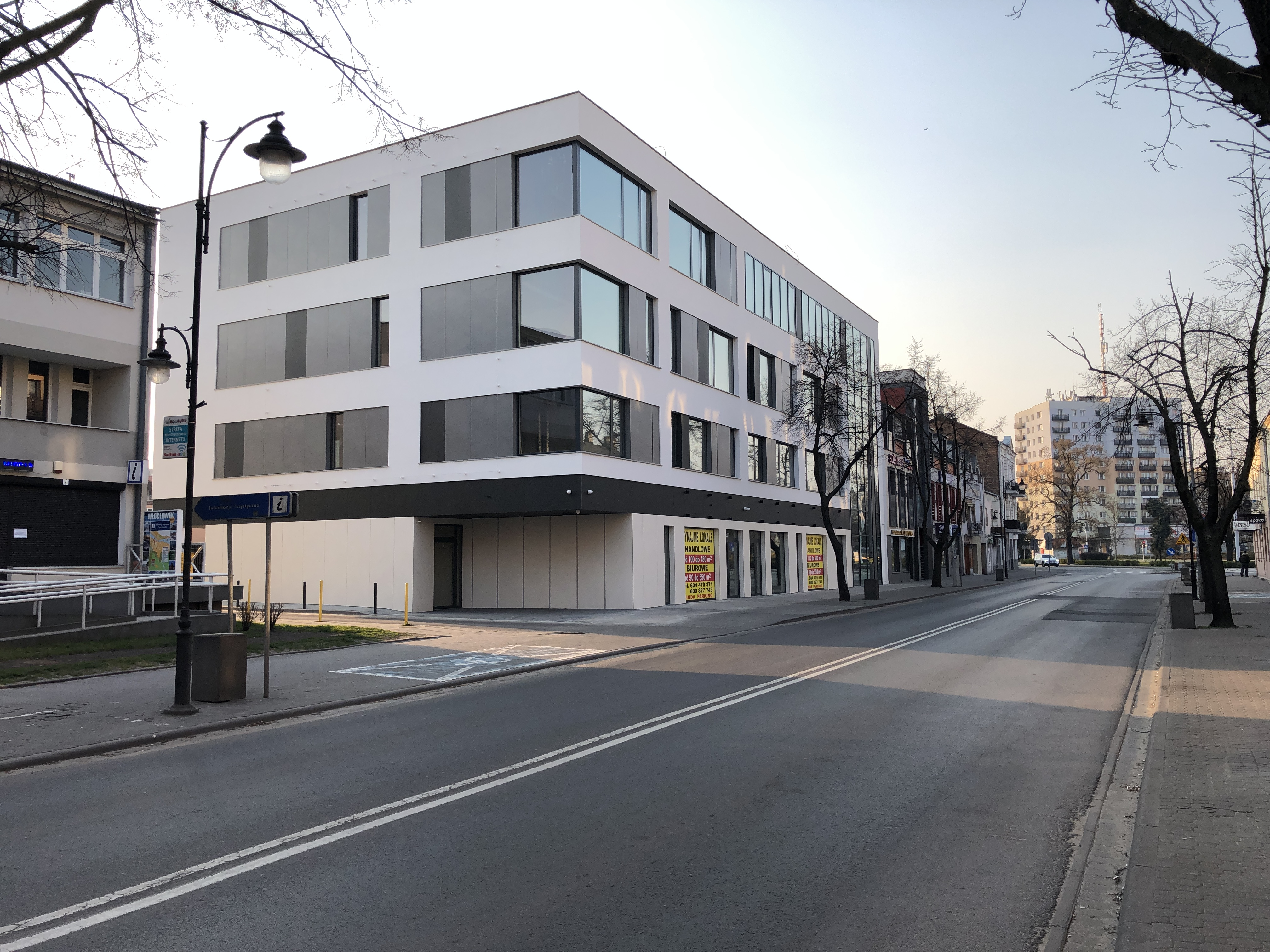 Ul. Warszawska 15 (2020 r.)